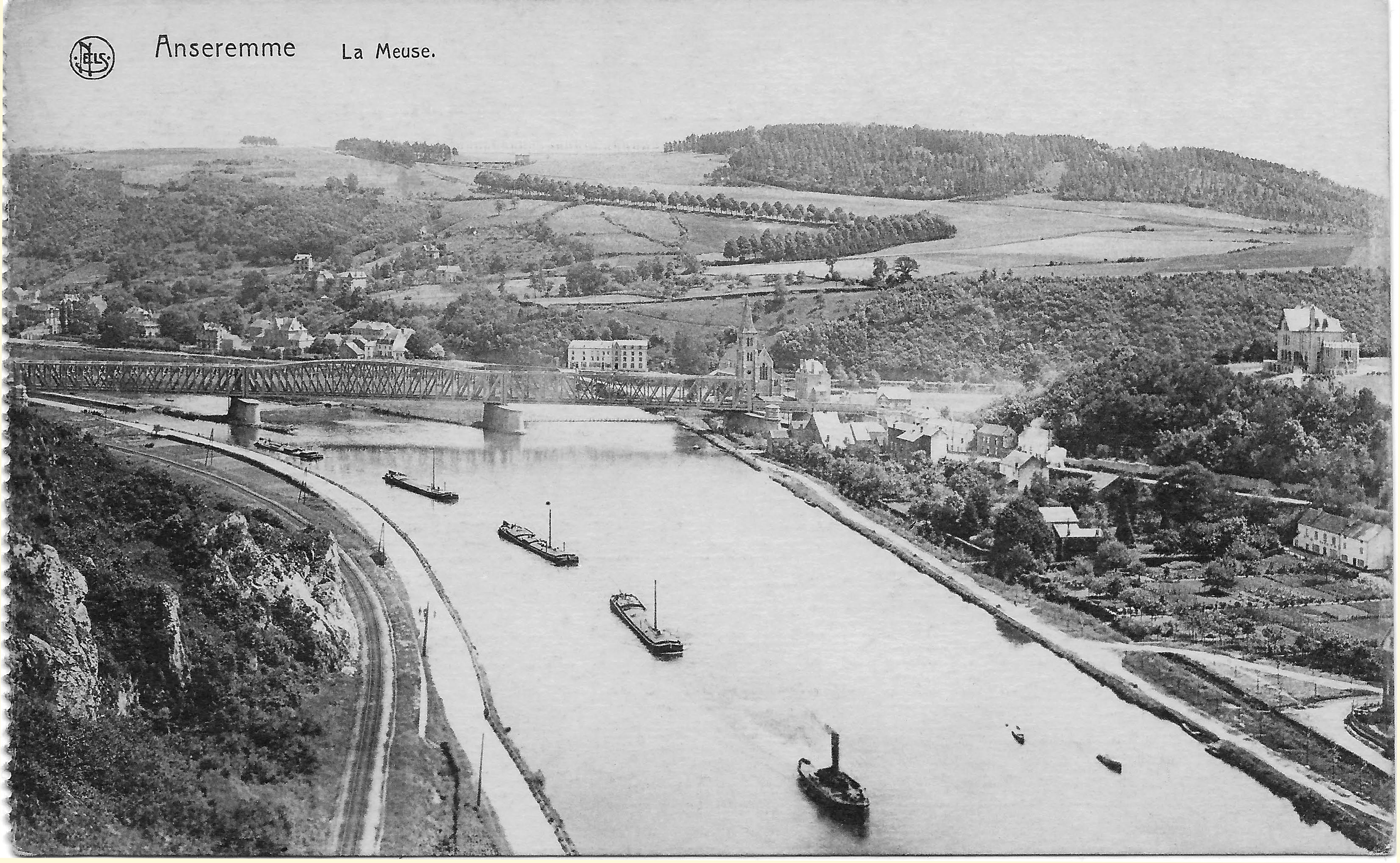 Briefkaart van Anseremme met binnenvaart boten die stroomopwaarts van de Maas getrokken worden.